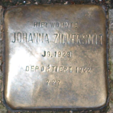 Stolperstein in Soest Grandweg 15 Johanna Zilversmit